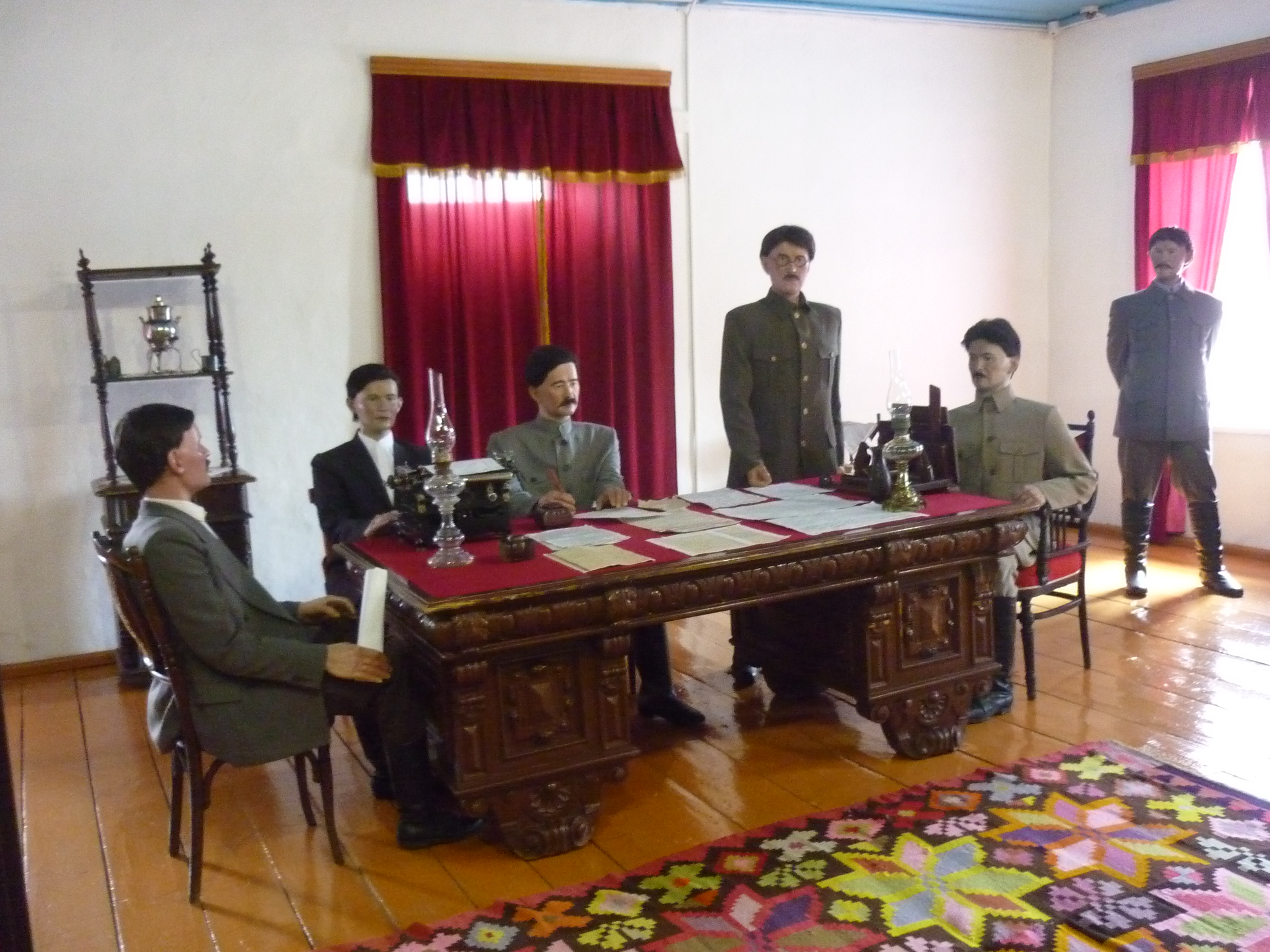 Башҡортса: Темәс тарих-тыуған яҡты өйрәнеү мүзейы